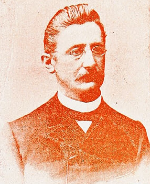 Sr. D. Luis Rudloff Primer Alcalde de la Comuna de Valdivia.